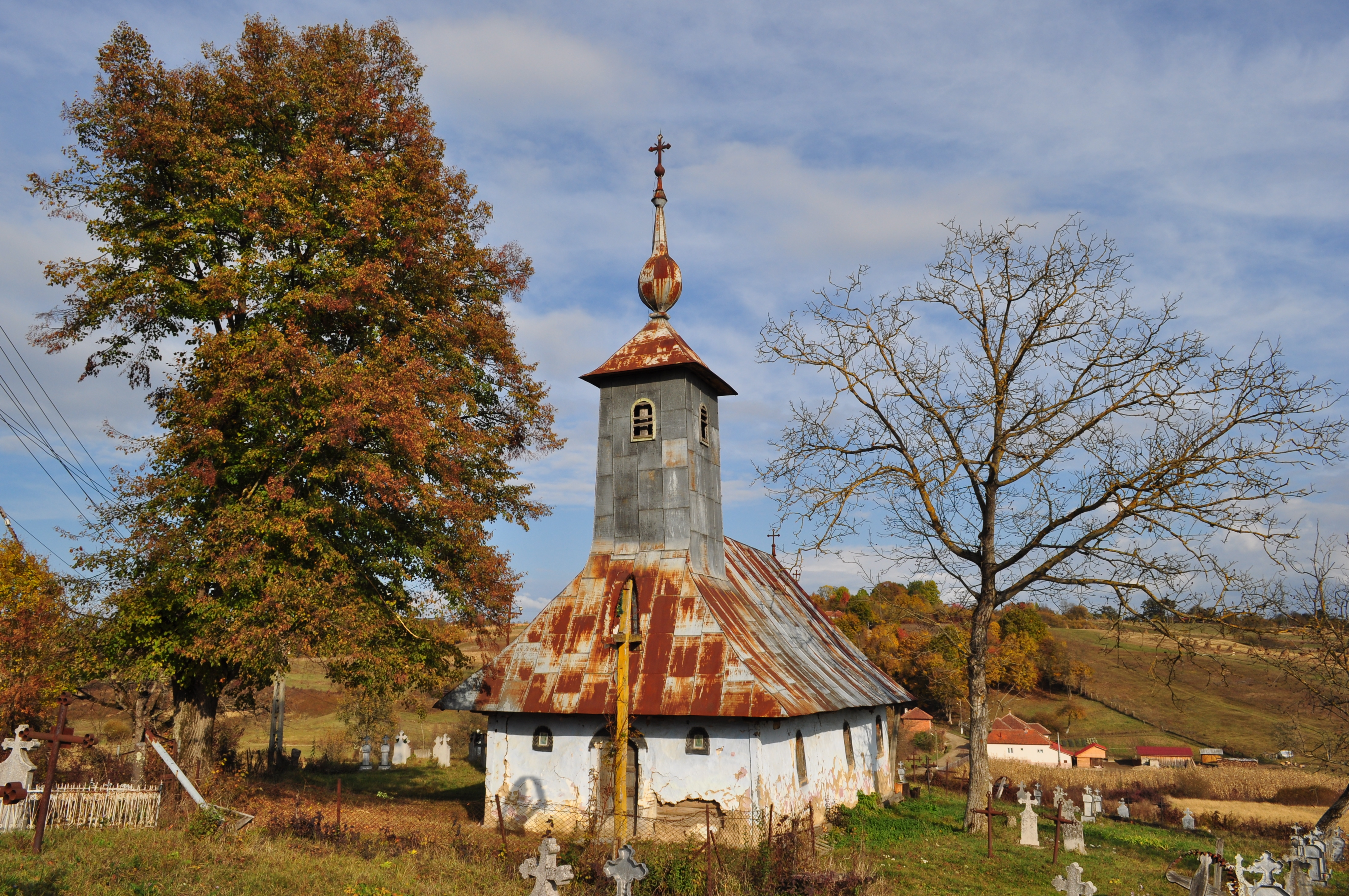 Biserica de lemn „Nașterea Maicii Domnului” din Săucani, județul Bihor